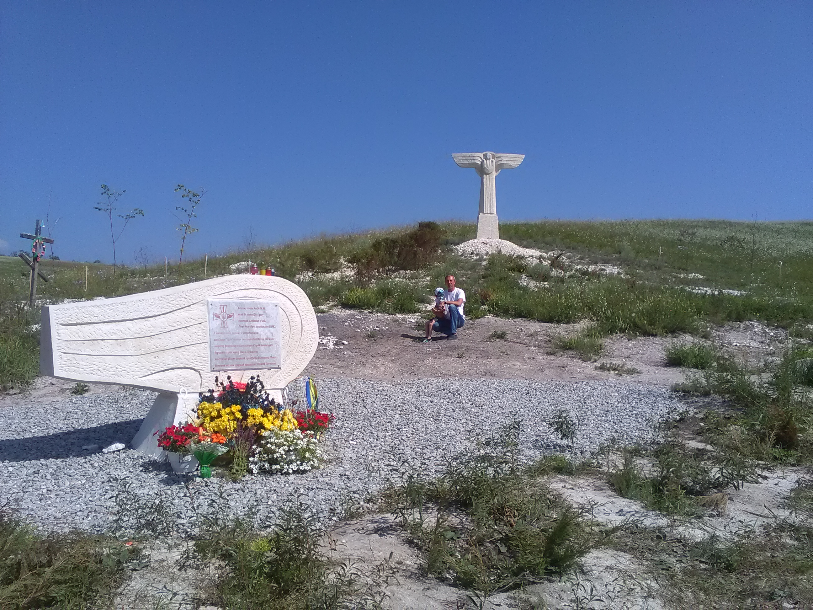 Мемореальний комплекс с.Пришиб Донецька обл